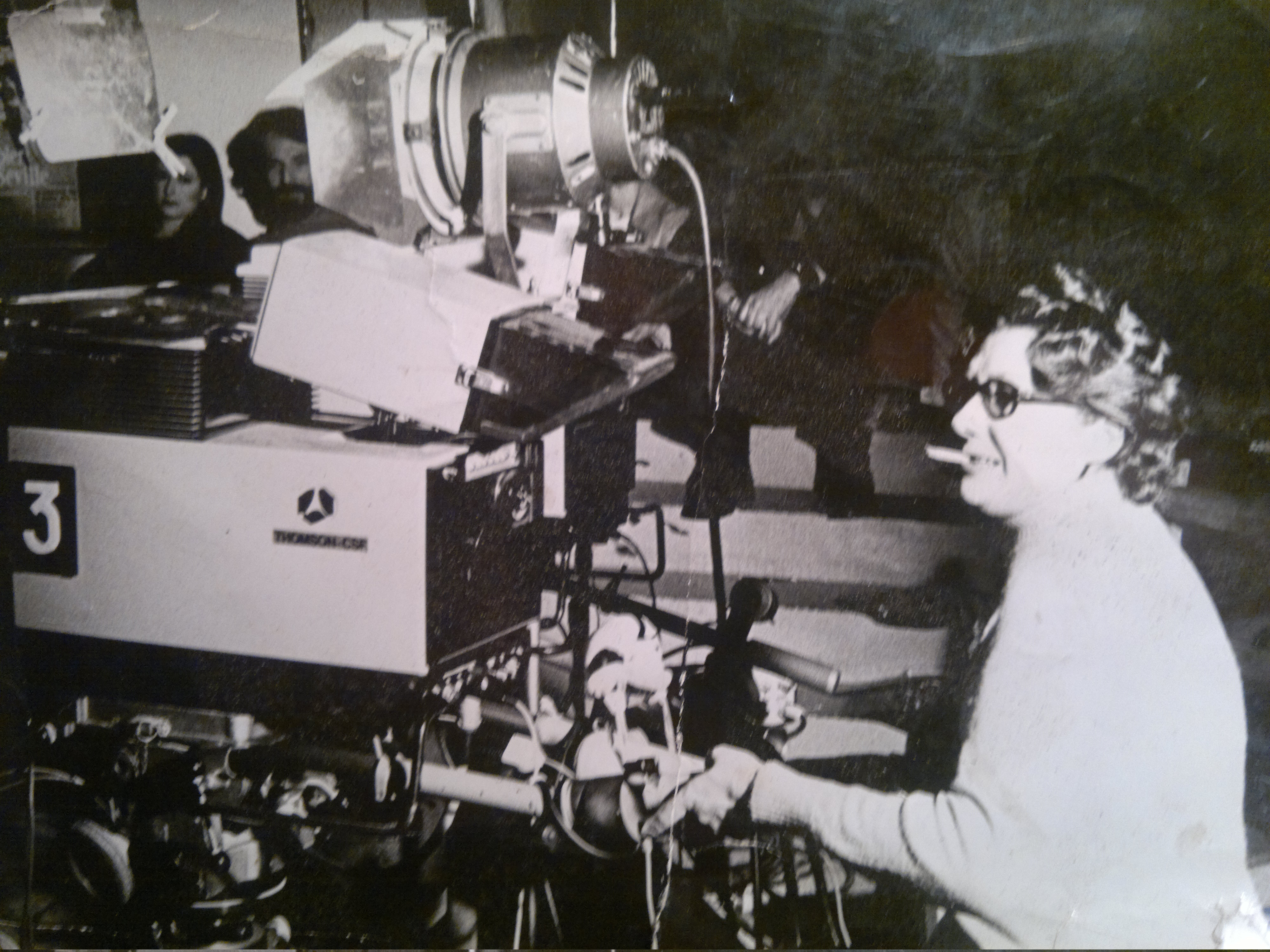 Monique Créteur, le 9 novembre 1974 lors de la captation d'Ubu roi joué par Le petit théâtre de marionnettes de Nantes filmé par FR3 au théâtre du C.I.O. Photo noir & blanc collection Monique Créteur